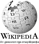 waray-waray wikipedia logo